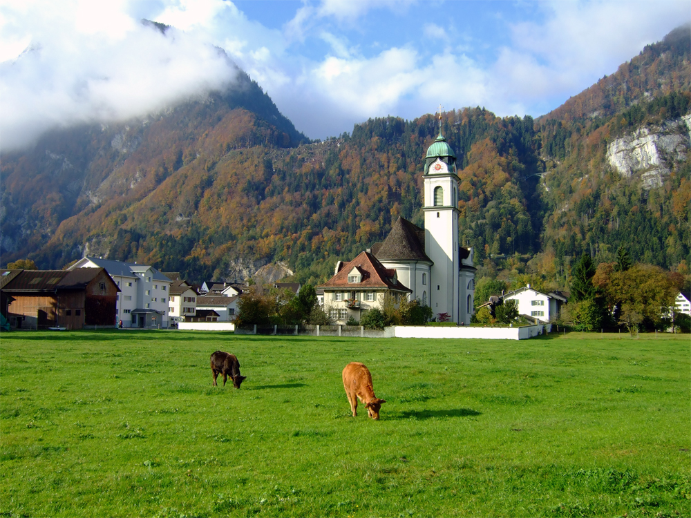 Kirche von Näfels GL